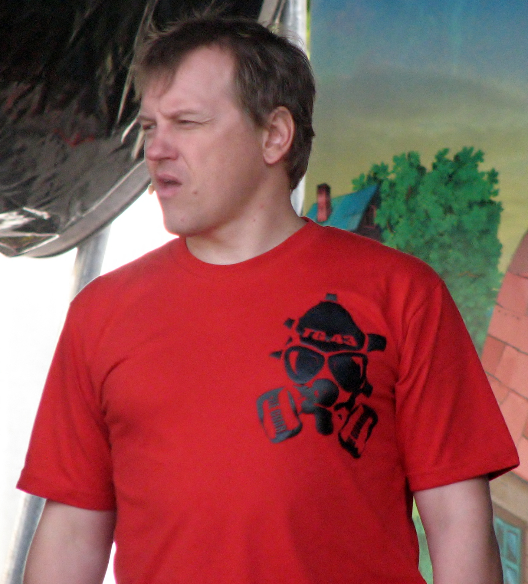 Venno Loosaar Tallinnas Vabaduse väljakul toimunud aabitsapeol